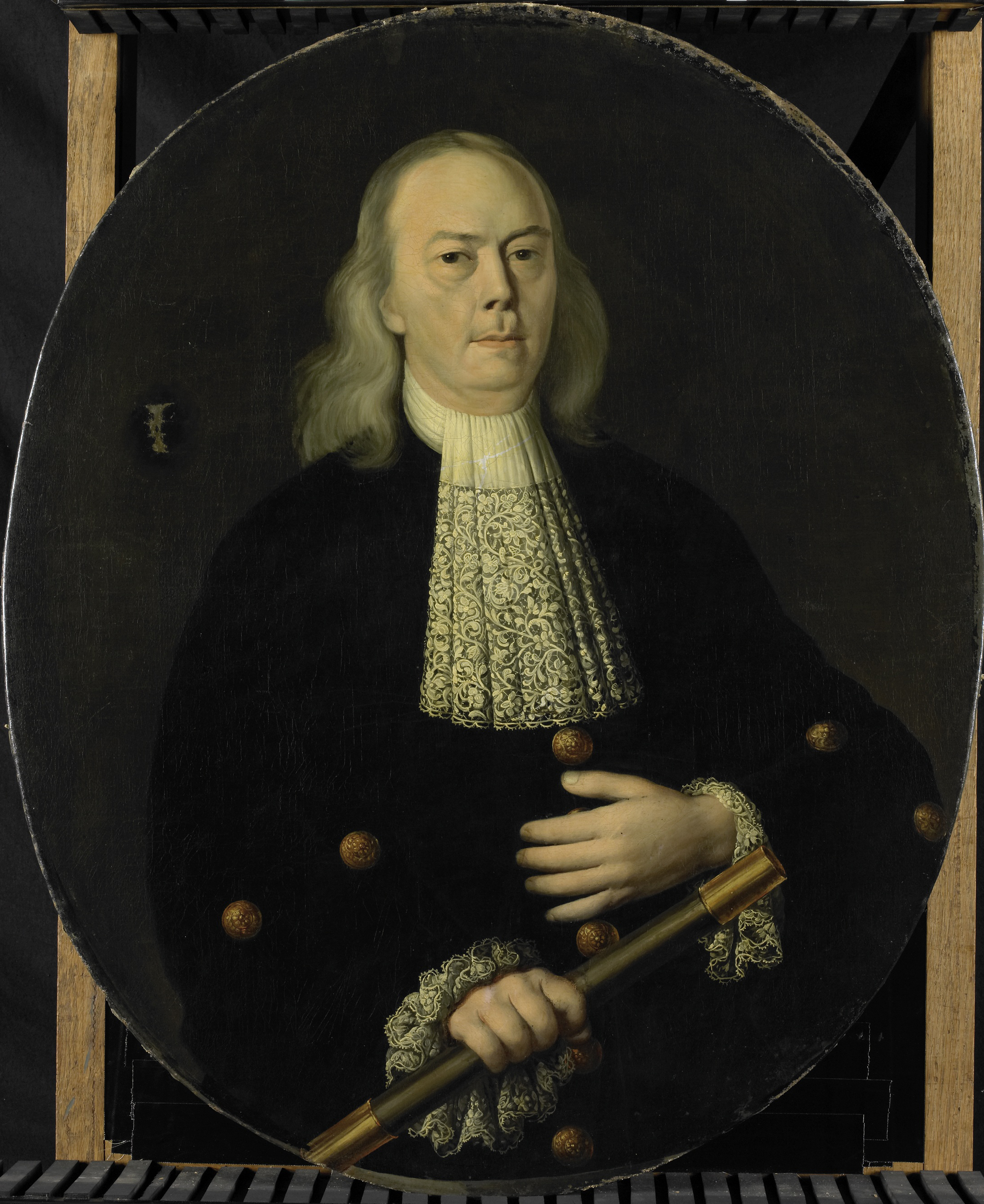 Portret van Abraham van Riebeeck (1653-1713). Gouverneur-generaal van Nederlands Oost Indië (1709-13). Ten halven lijve in ovaal, staande, commadostaf in de rechterhand. Pendant van SK-A-812.